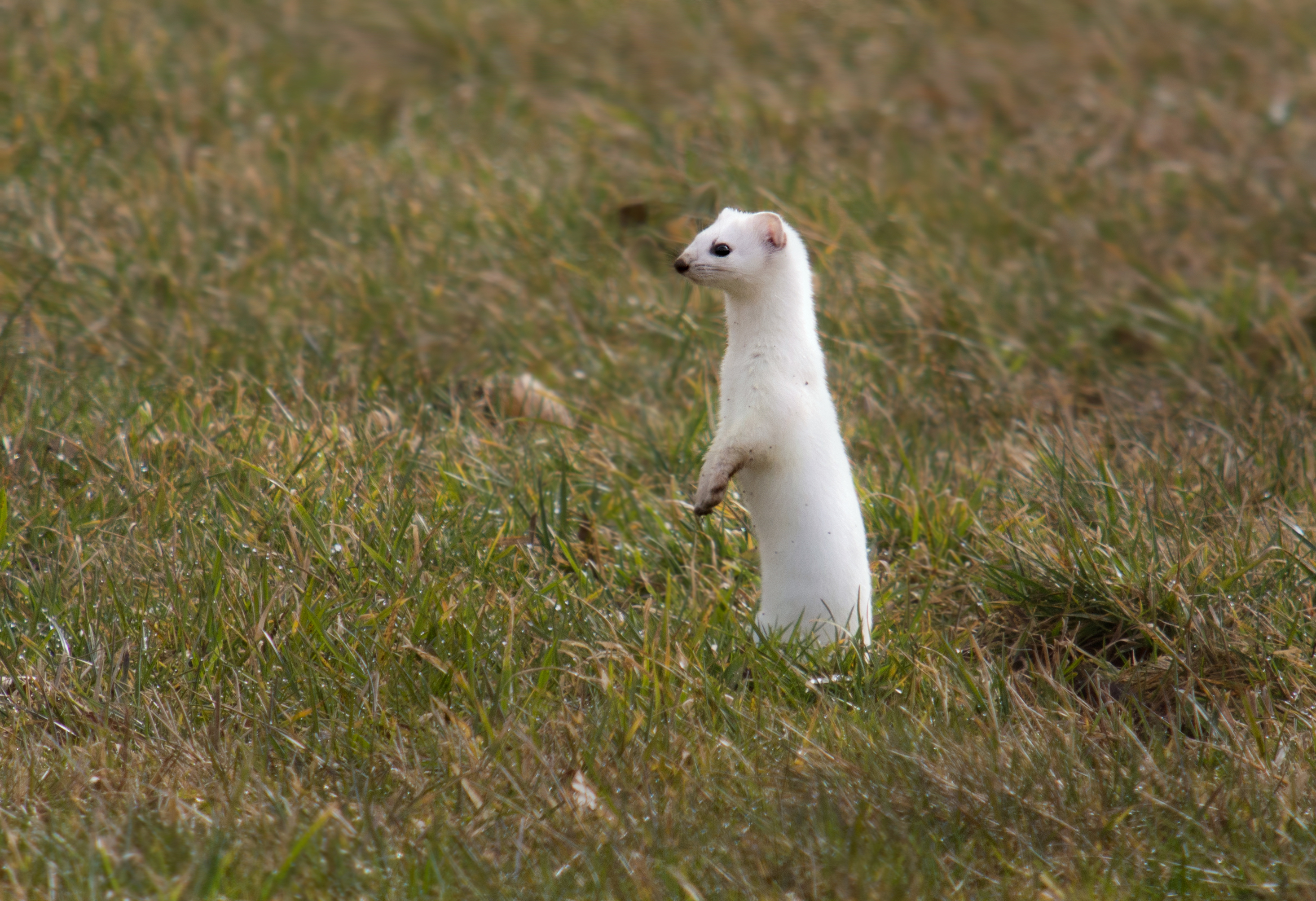 Hermelin (Mustela erminea) in Mürringen, Ostbelgien (Nähe Holzwarchetal, aber außerhalb Naturschutz- bzw. FFH-Gebiet) Digiscoping with Swarovski ATM 80 HD 30 X, Nikon1 V1 + 11-27,5 mm lens (Adapter DCB)